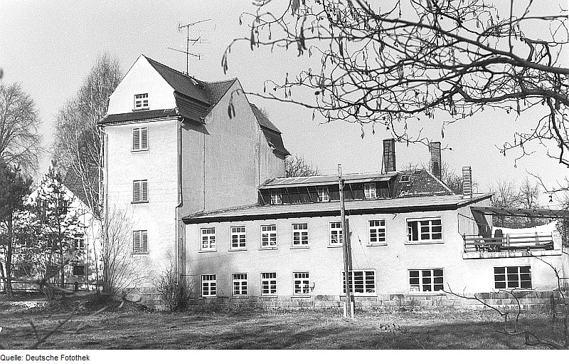 Original image description from the Deutsche Fotothek Göda-Coblenz. Fehrmann-Mühle